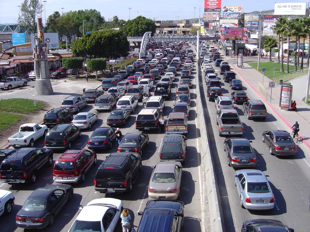 Fronteira Tijuana - San Diego